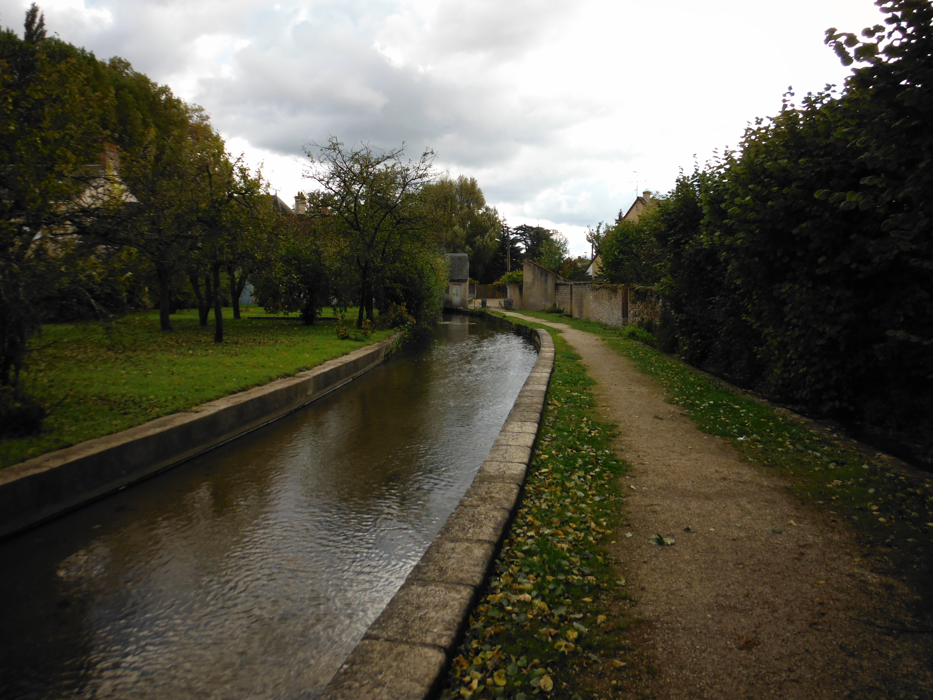 la Tronne à Mer entre les rues Jacques Bizeray et Toutevoie